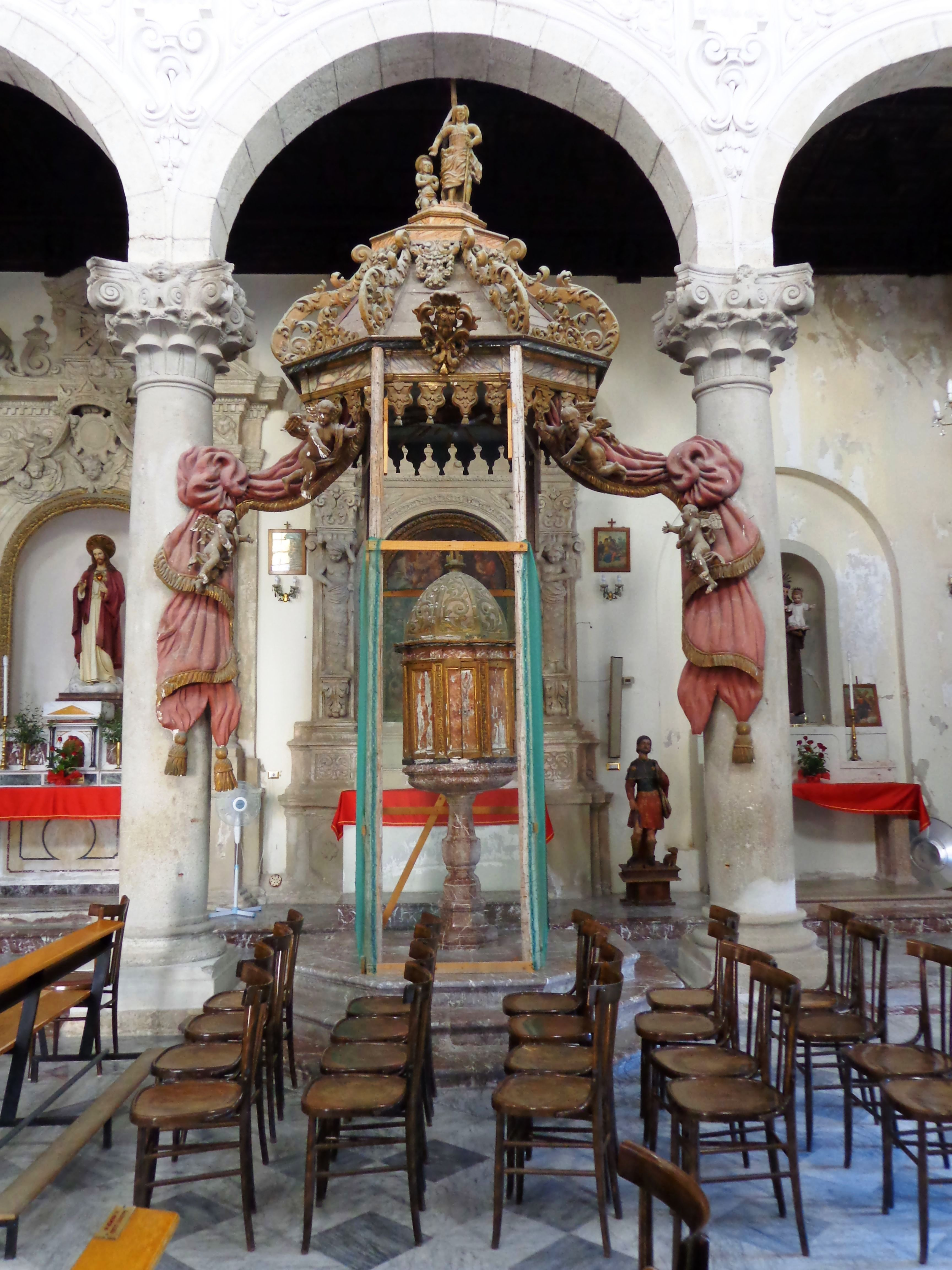 Duomo Condrò Fonte